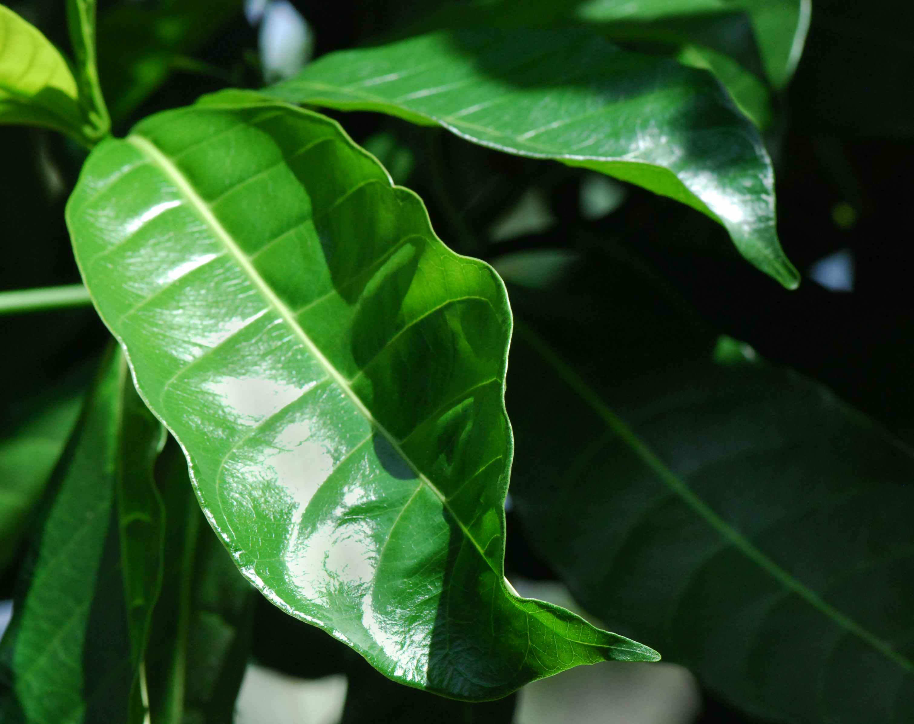 Tabernaemontana citrifolia, feuille, morne Gommier, Martinique